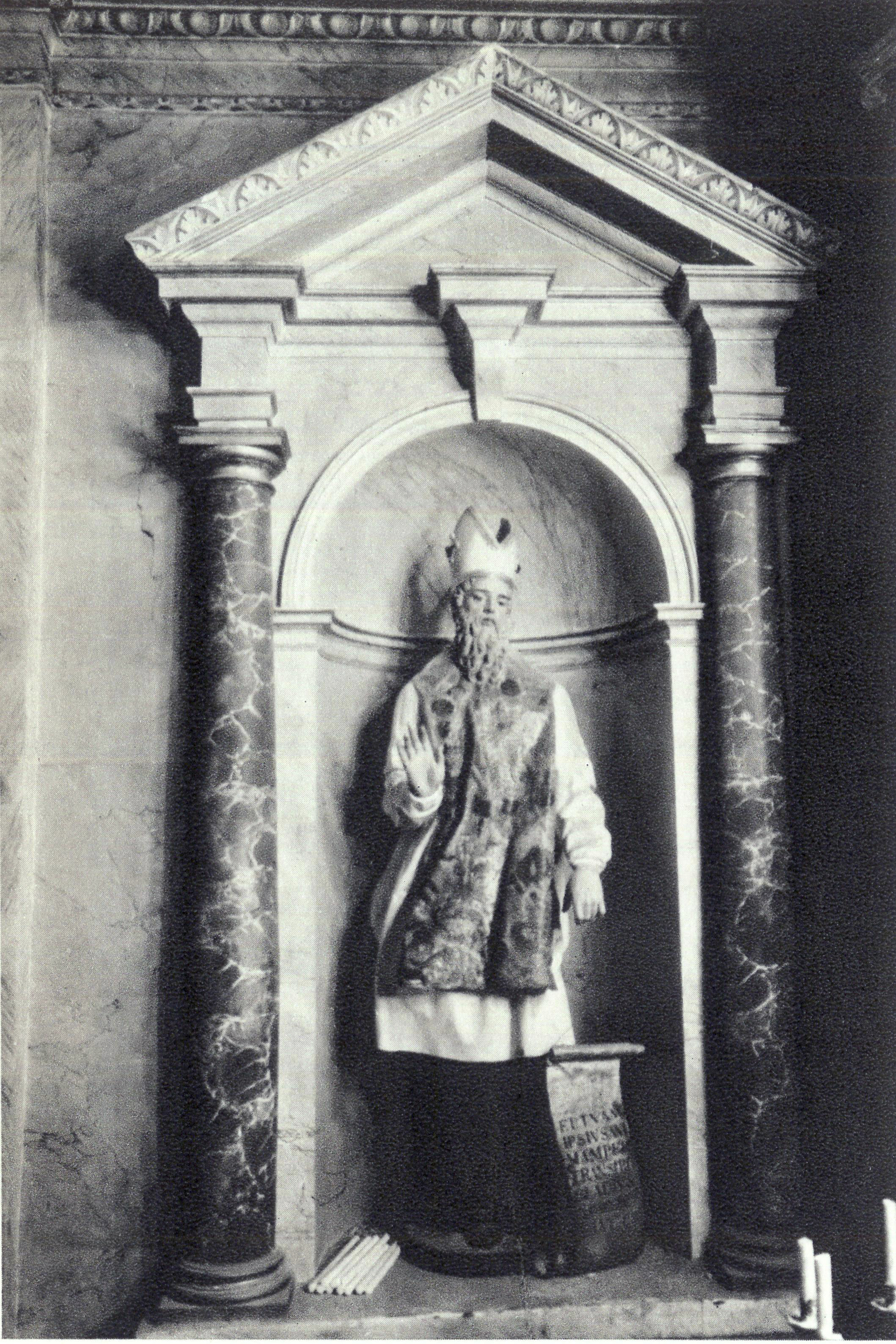 Antigament estaba a la paret lateral dreta del Retaule Central del Santuari de la Caritat d'Illescas.